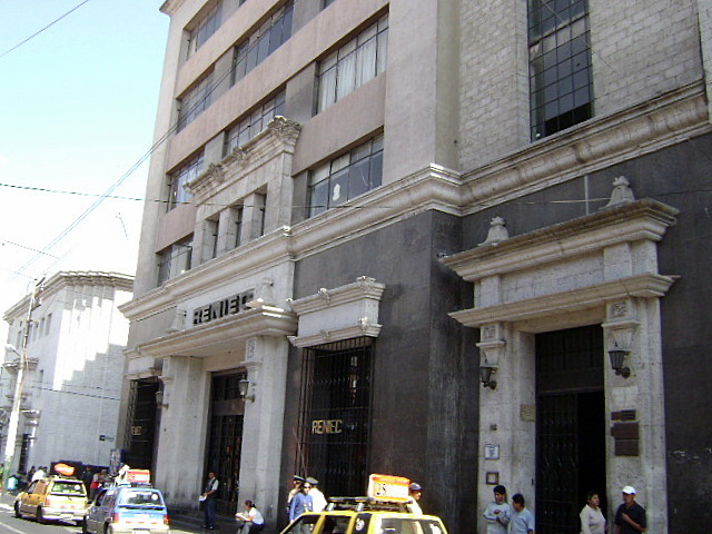 RENIEC